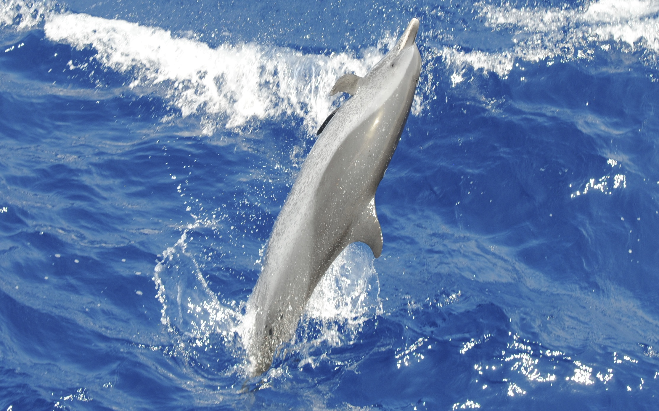 Golfinho pintado a saltar